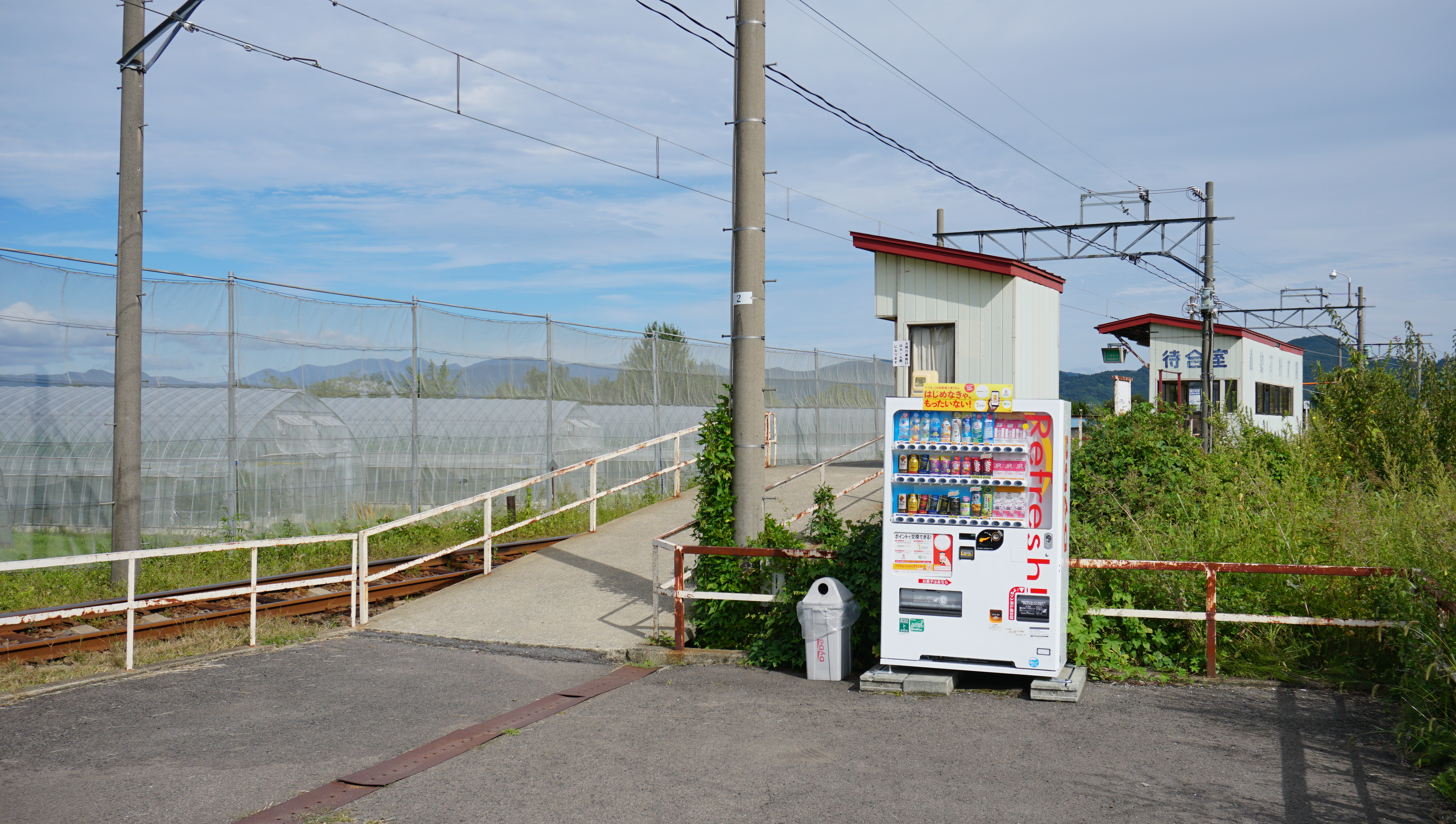 弘南鉄道大鰐線 義塾高校前駅